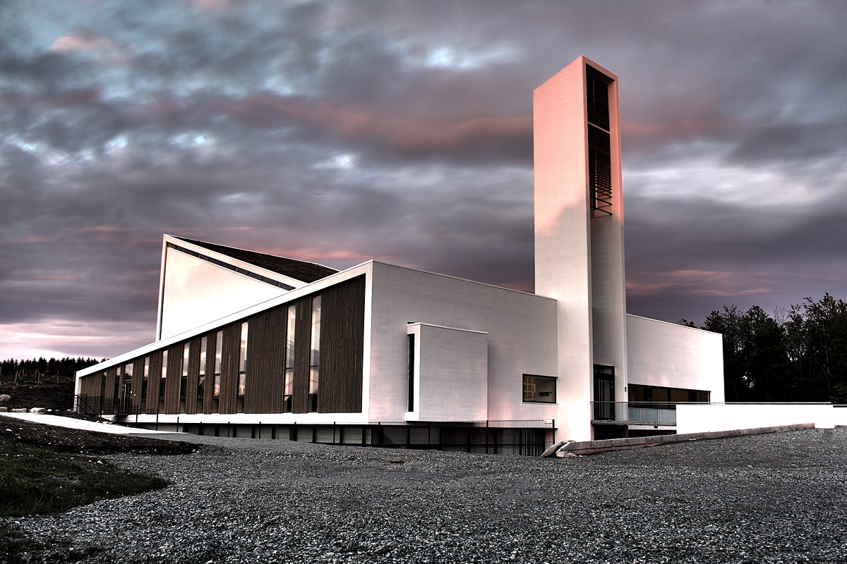 Frøyland og Orstad Kyrkje